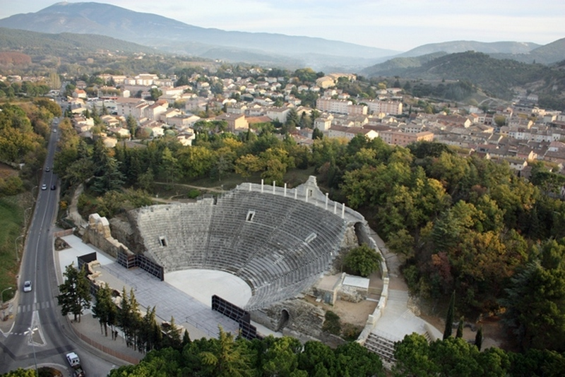 Vaison la romaine, le théâtre, Photo prise par ballon captif par Paul-Louis FERRANDEZ de la société MEROPS-Photo